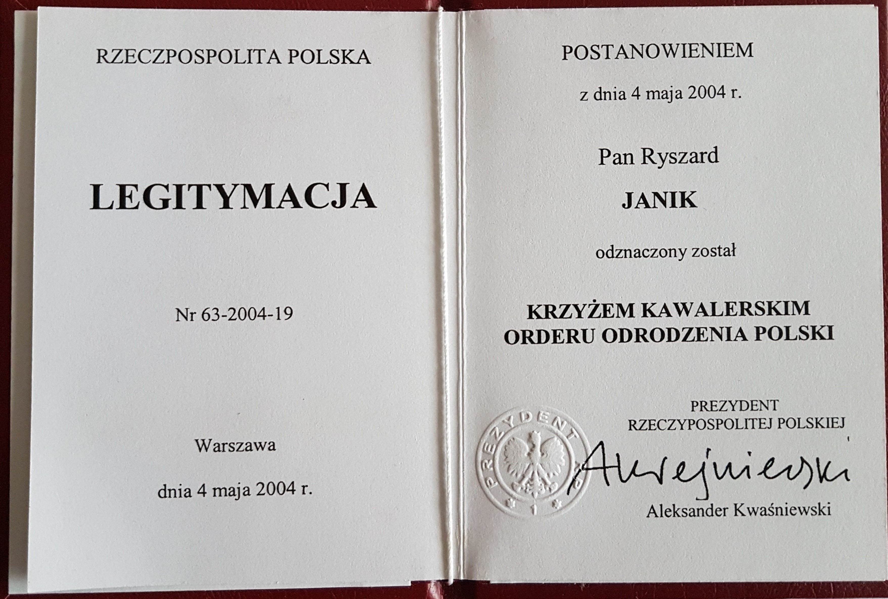 Legitymacja - Krzyż Kawalerski Orderu Odrodzenia Polski